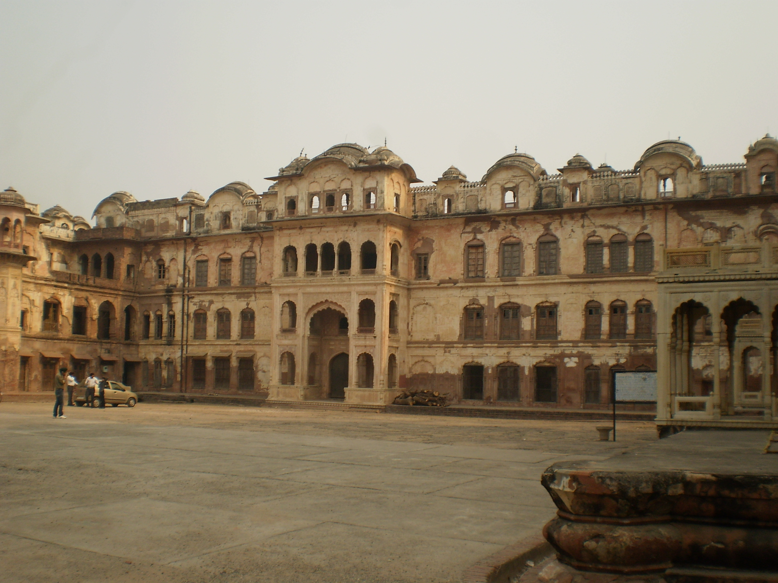 see file name